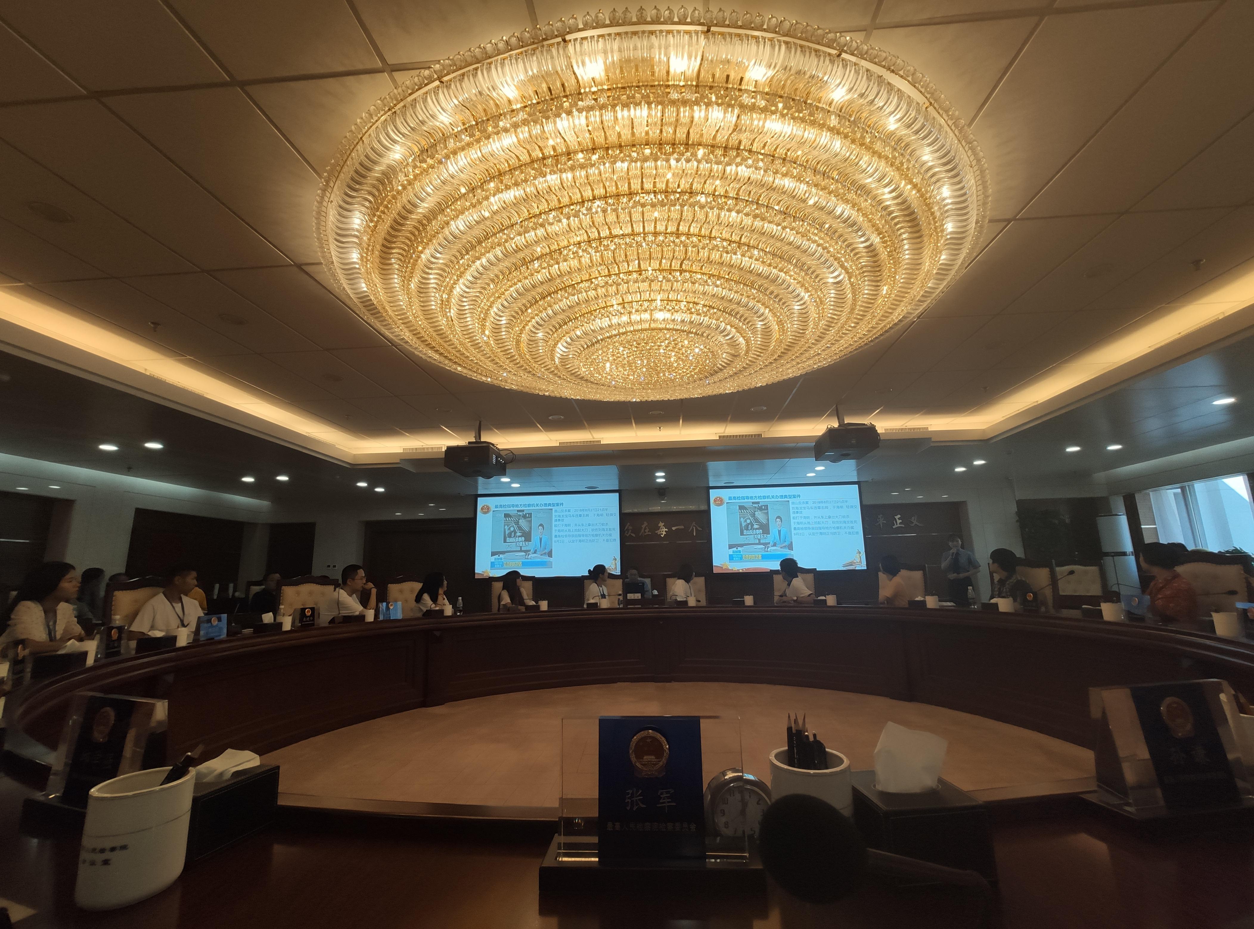 最高检检委会会议室